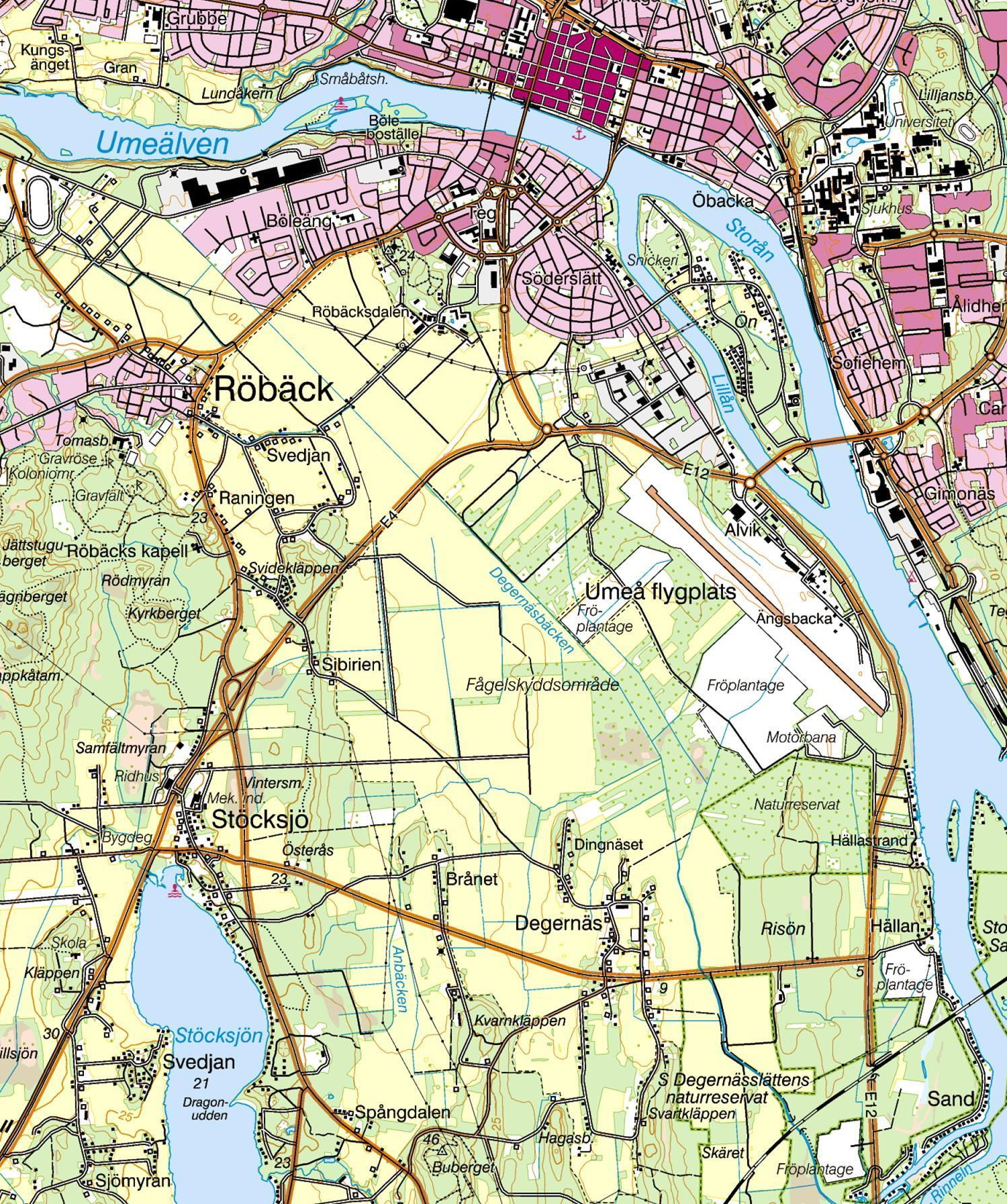 Röbäcksslätten, strax söder om tätorten Umeå. Utsnitt ur Terrängkartan, 713 Umeå. Kartdata: Lantmäteriet, licens CC BY.